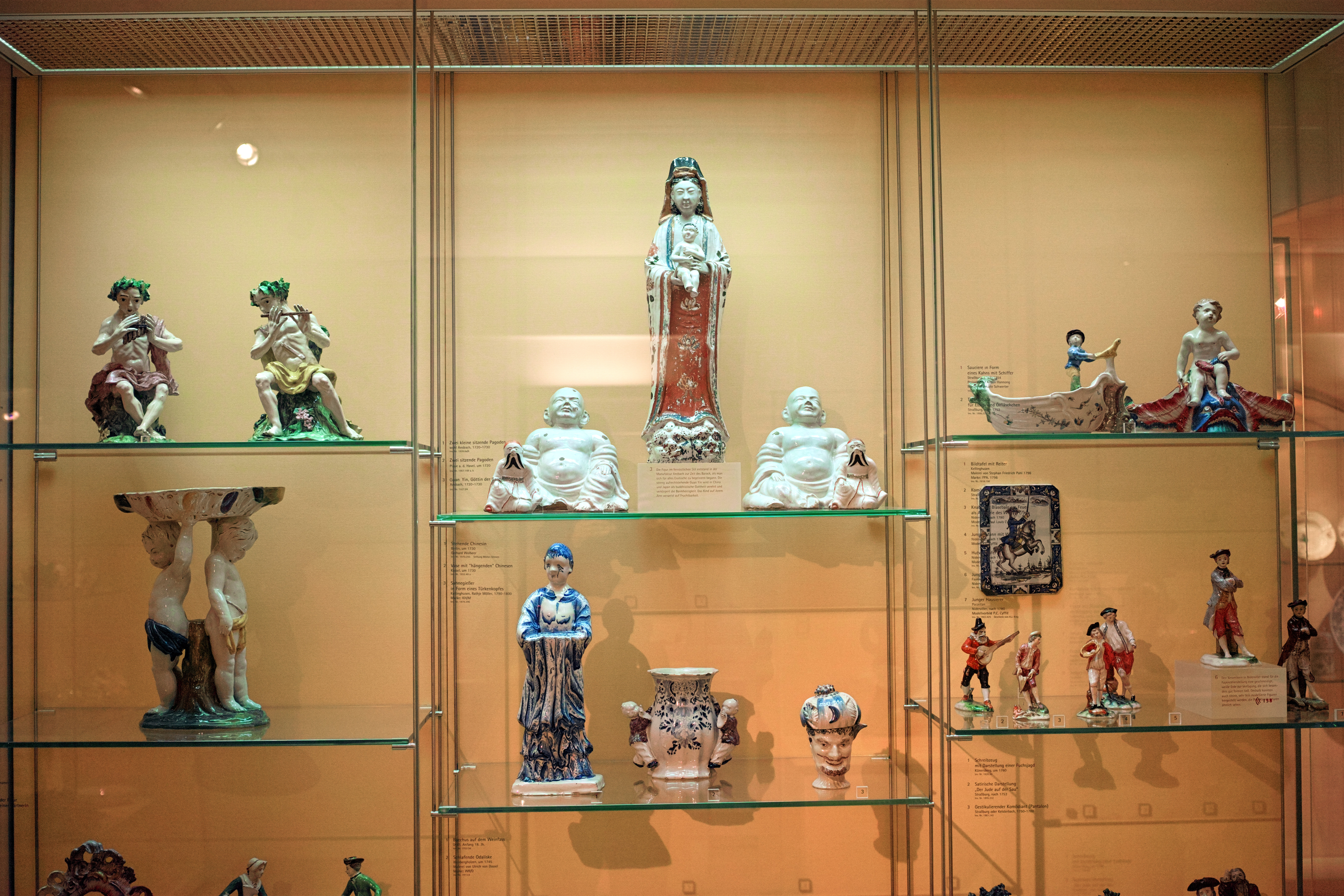 Museum für Kunst und Gewerbe, Hamburg. Vitrine mit europäischen Porzellanfiguren des 18. Jh.; Der Weißabgleich erfolgte für das Porzellan, daher ist der Hintergrund rotstichig. Die Daten zu den Figuren sind bei Darstellung 1:1 lesbar.